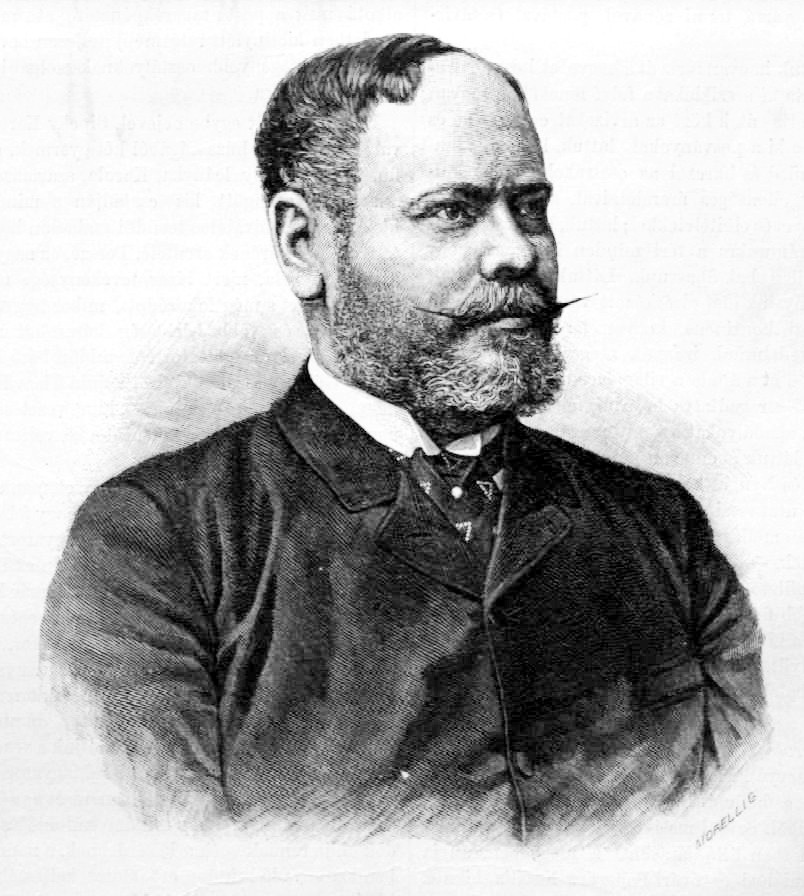 Baross Gábor (1848–1892) politikus, miniszter portréja. Morelli Gusztáv metszete